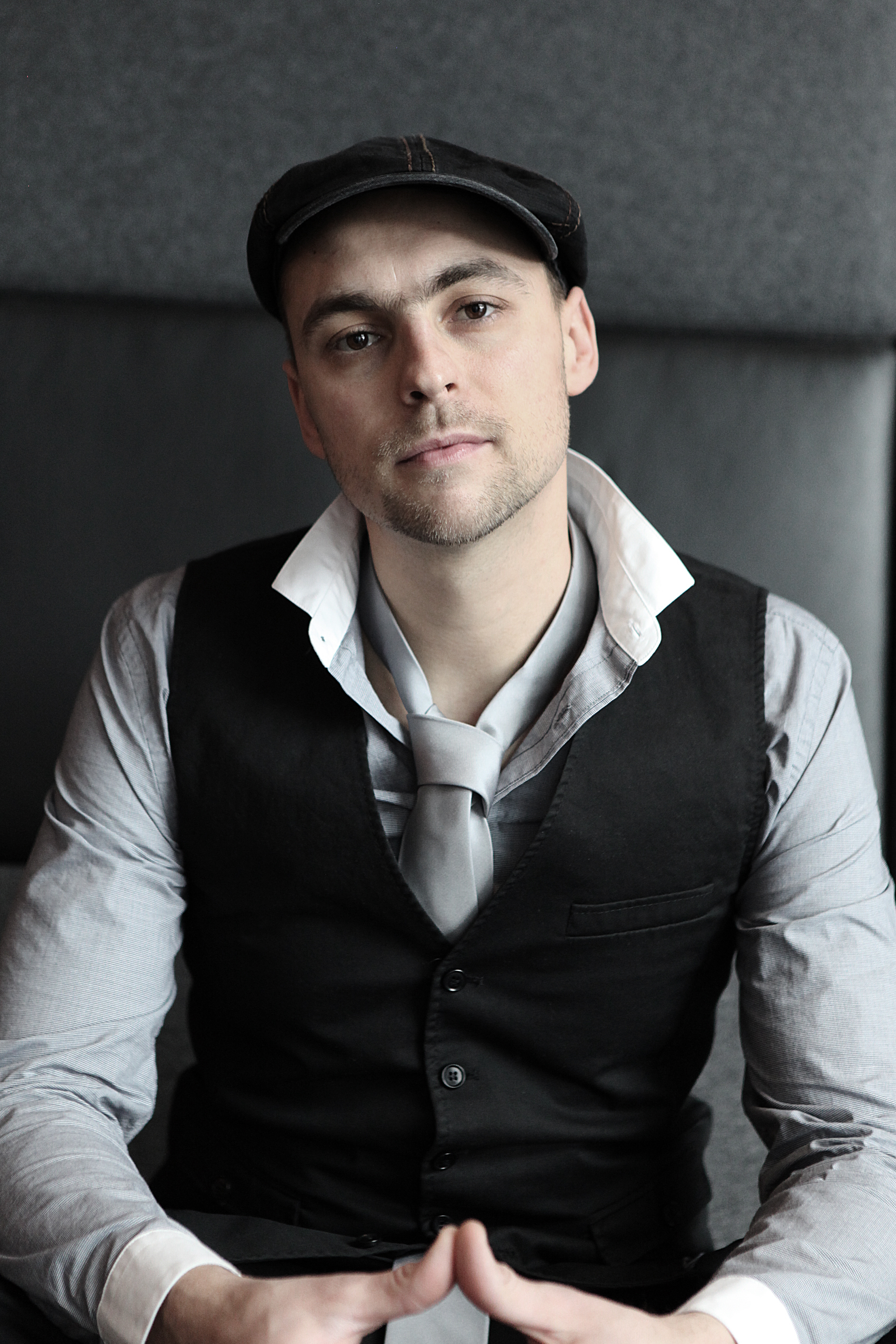 Max Mutzke